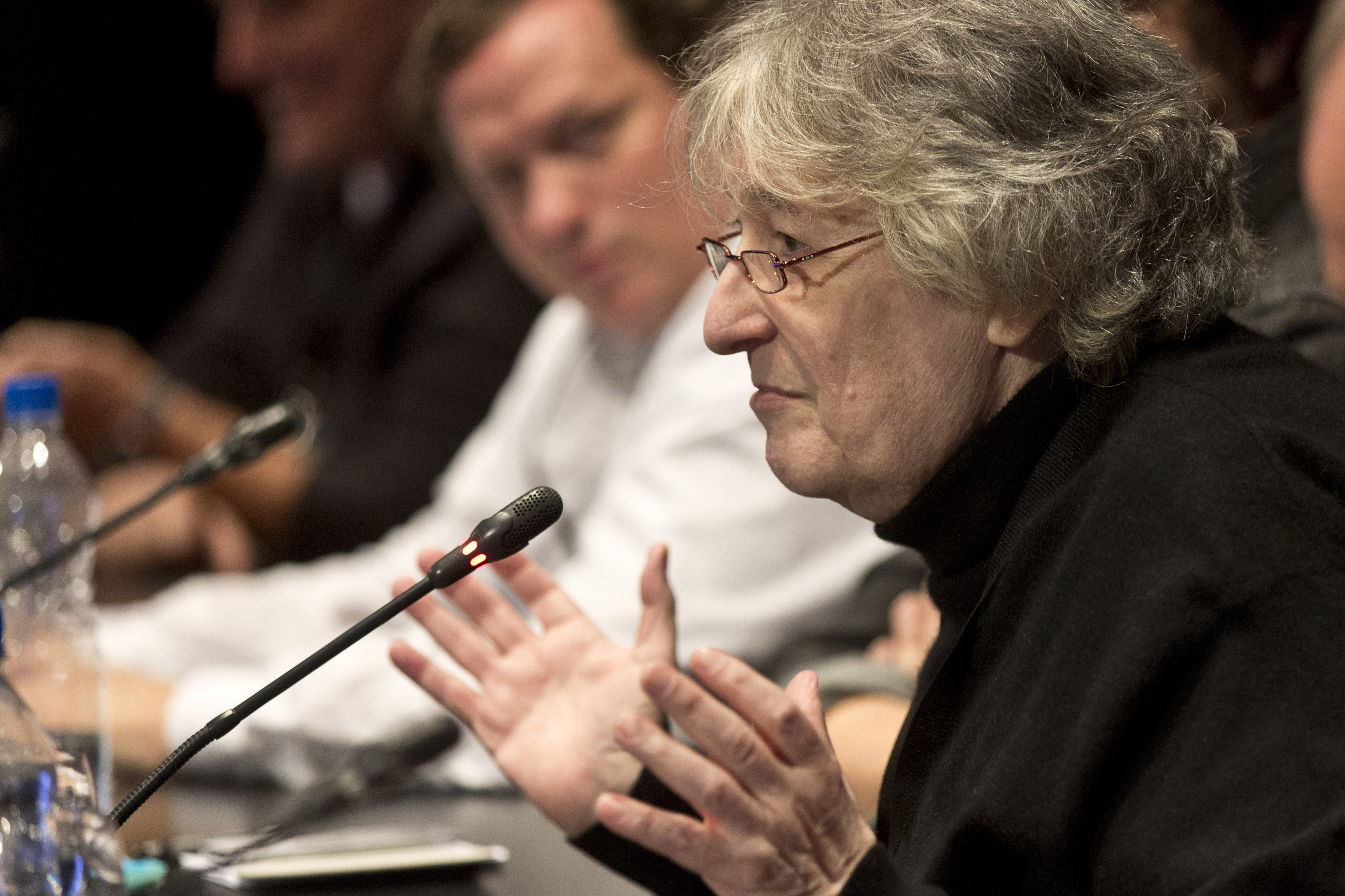 San Miguel de Tucumán, 7 de julio de 2015 -Fotos: Mauro Rico / Ministerio de Cultura de la Nación.